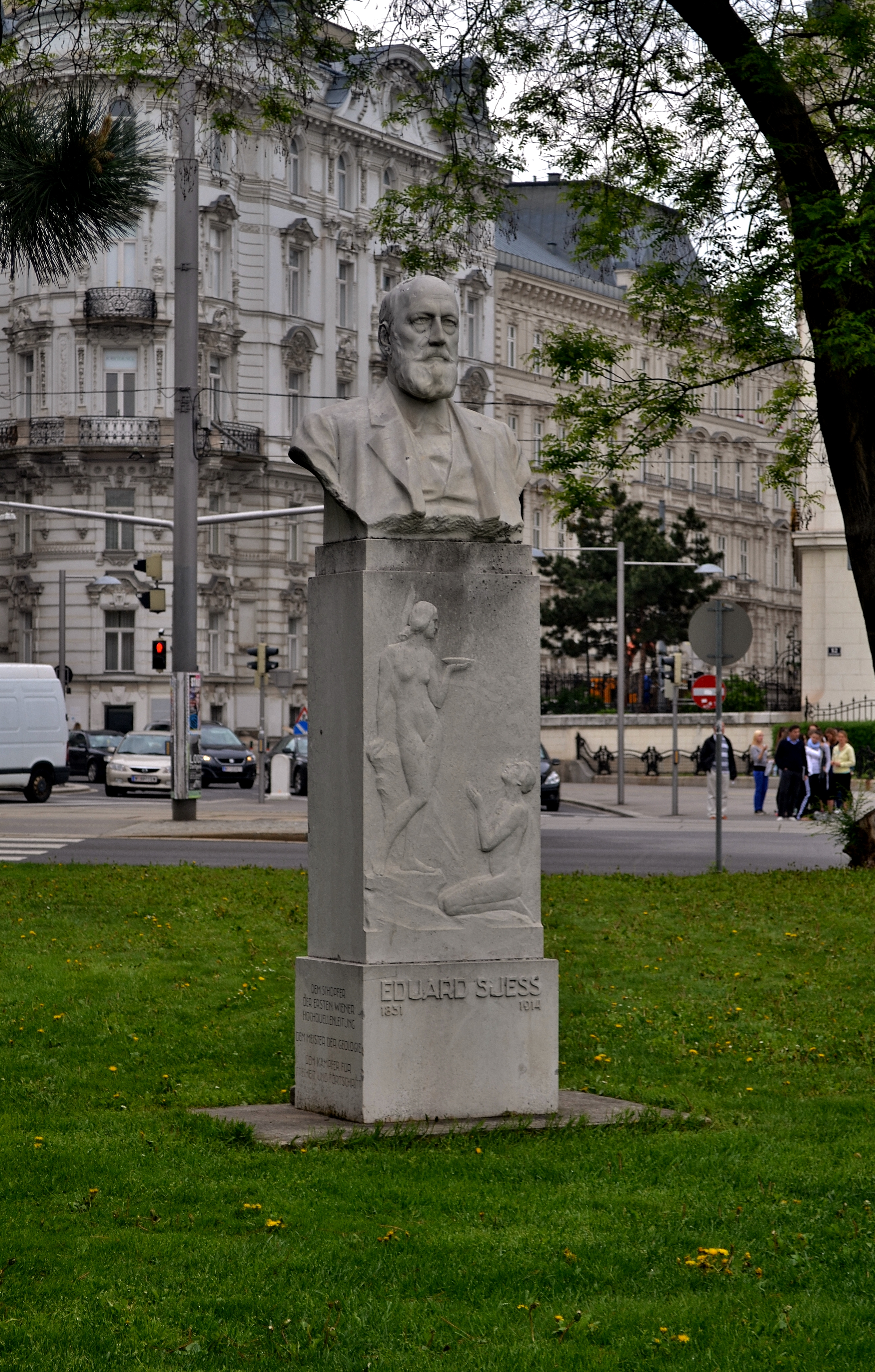 Площадь Шварценберга.